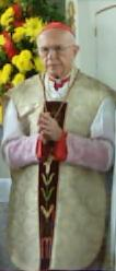 O cardeal Eugênio Sales, ao lado do irmão, Heitor, na comemoração do cinquentenário de sua ordenação episcopal e dos 60 anos de ordenação sacerdotal, em missa solene realizada na matriz de Nossa Senhora da Guia, em Acari-RN, no dia 15/08/2004.